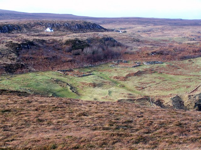 Ruined settlement by Galtrigill, Skye